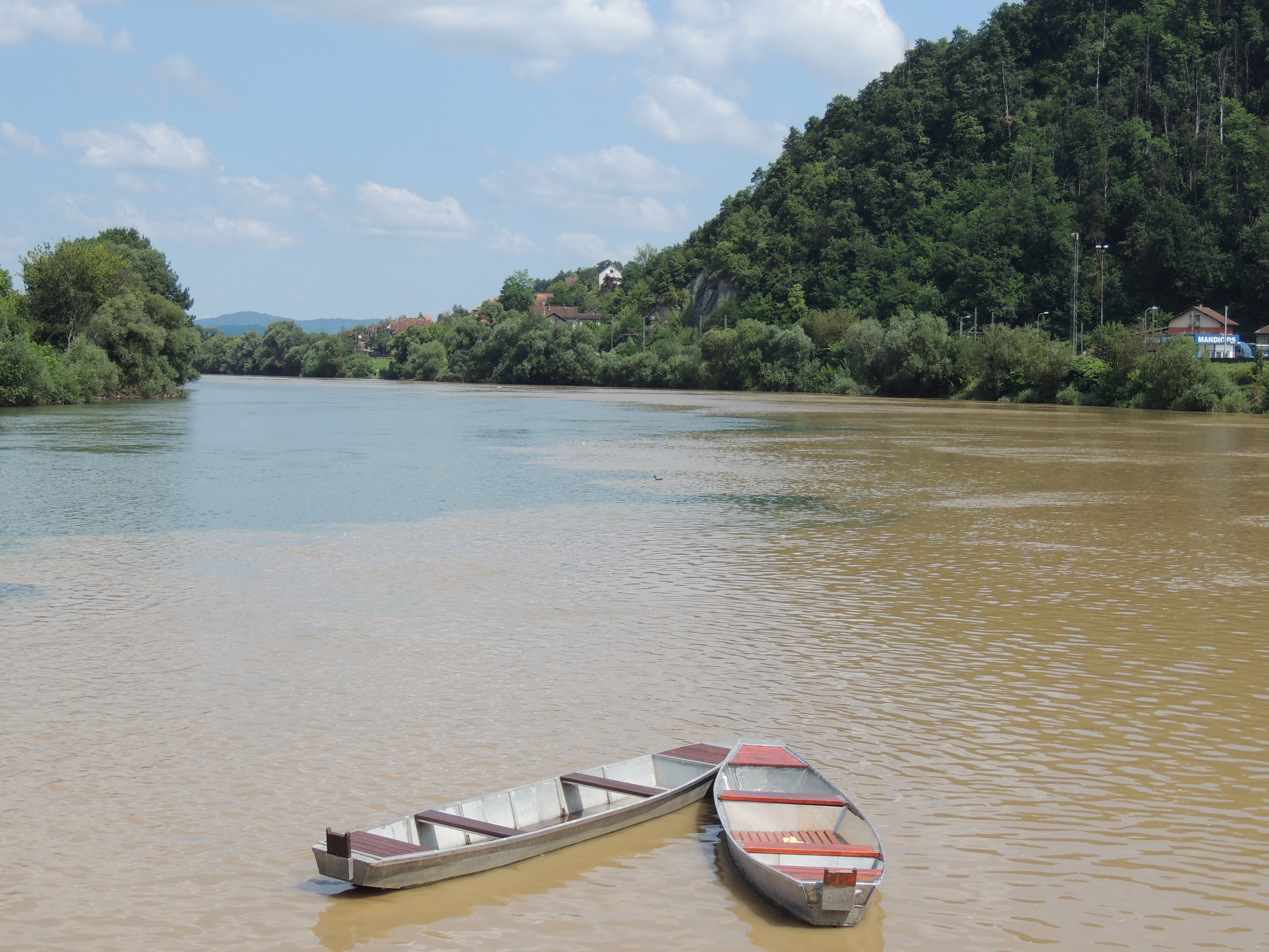 ZAGRLJAJ SANE I UNE : Poljubac dva čamca, This image was uploaded as part of Trace of Soul 2018.